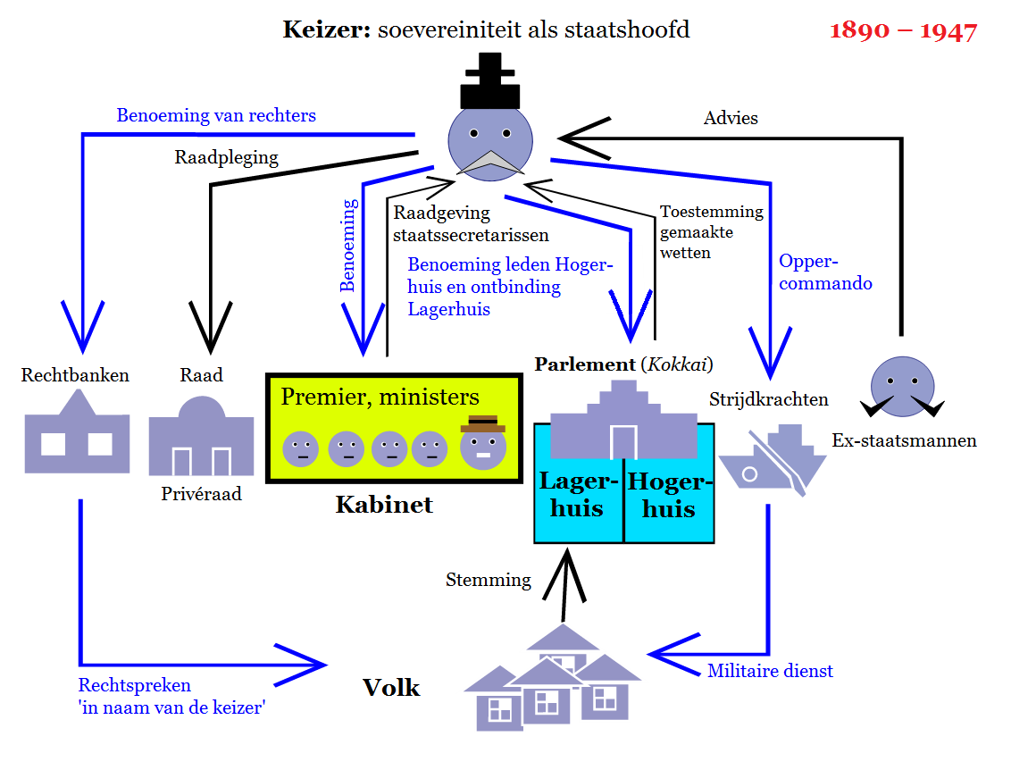 Een overzicht van de Japanse regering ten tijde van de Meiji-grondwet